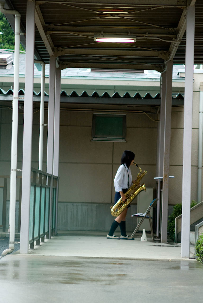 @蕨 自主練習 ?